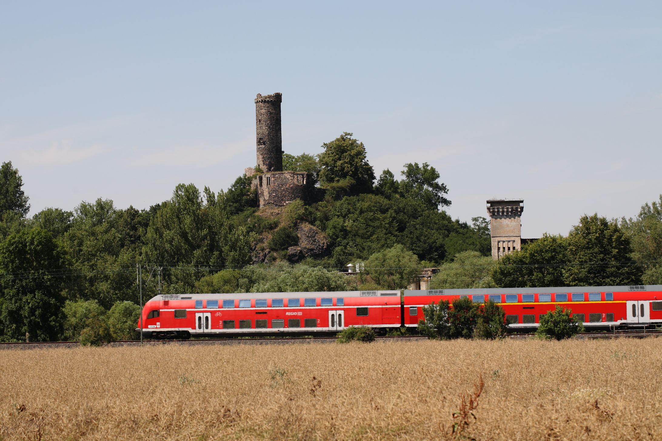 Die Burgruine Altenburg (eine mittelalterliche Burgruine beim Felsberger Ortsteil Altenburg) und ein Regio.